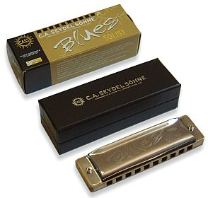 Seydel Bluesmundharmonia "Solist Pro" mit Holzkanzellen